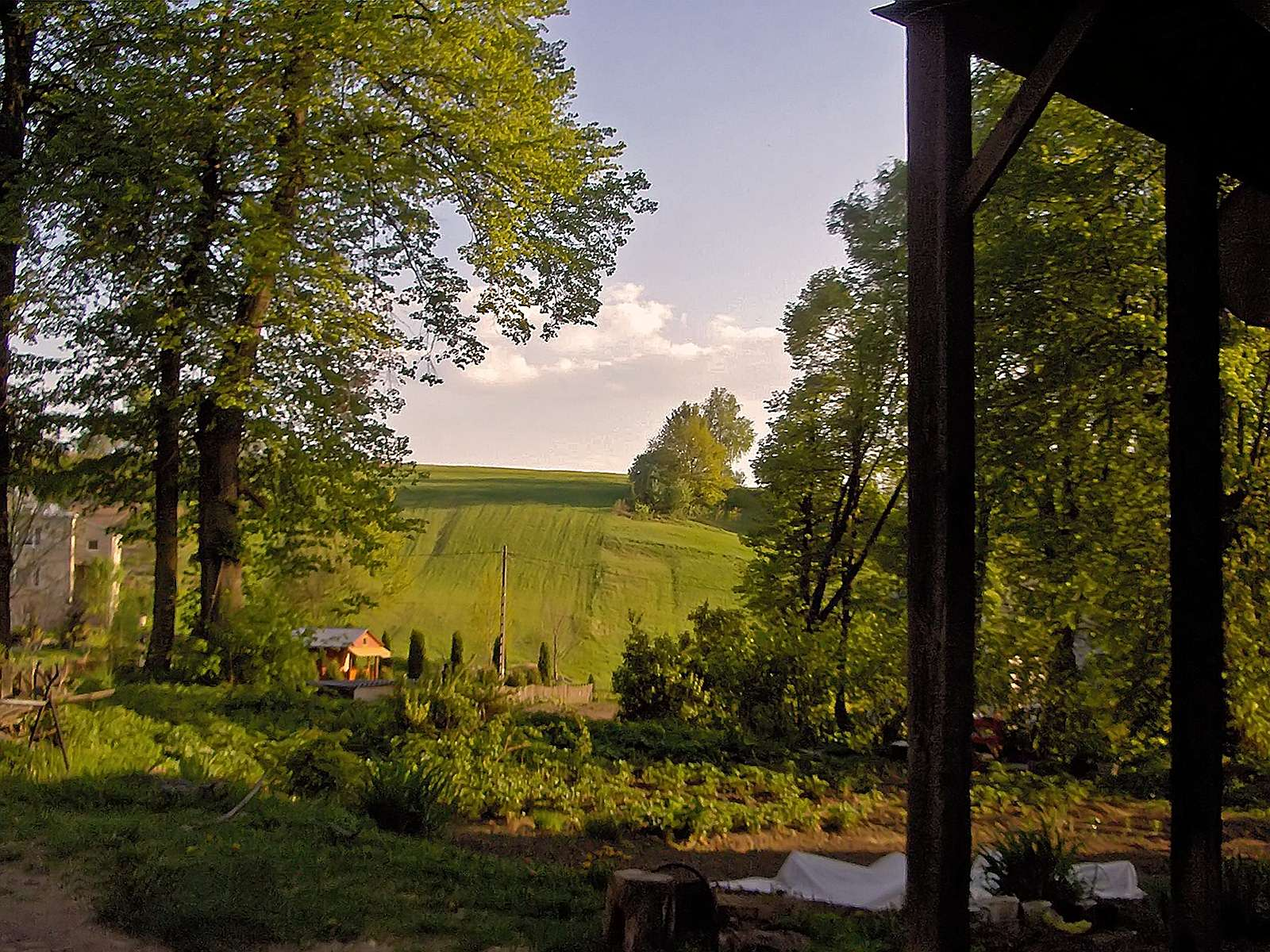 Grabownica Starzeńska - country in Podkarpacie Voivodship